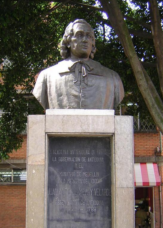 Busto de Juan Antonio Mon y Velarde, ubicado en Cra 48 Ecuador, con calle 57 Argentina, Medellín, Colombia